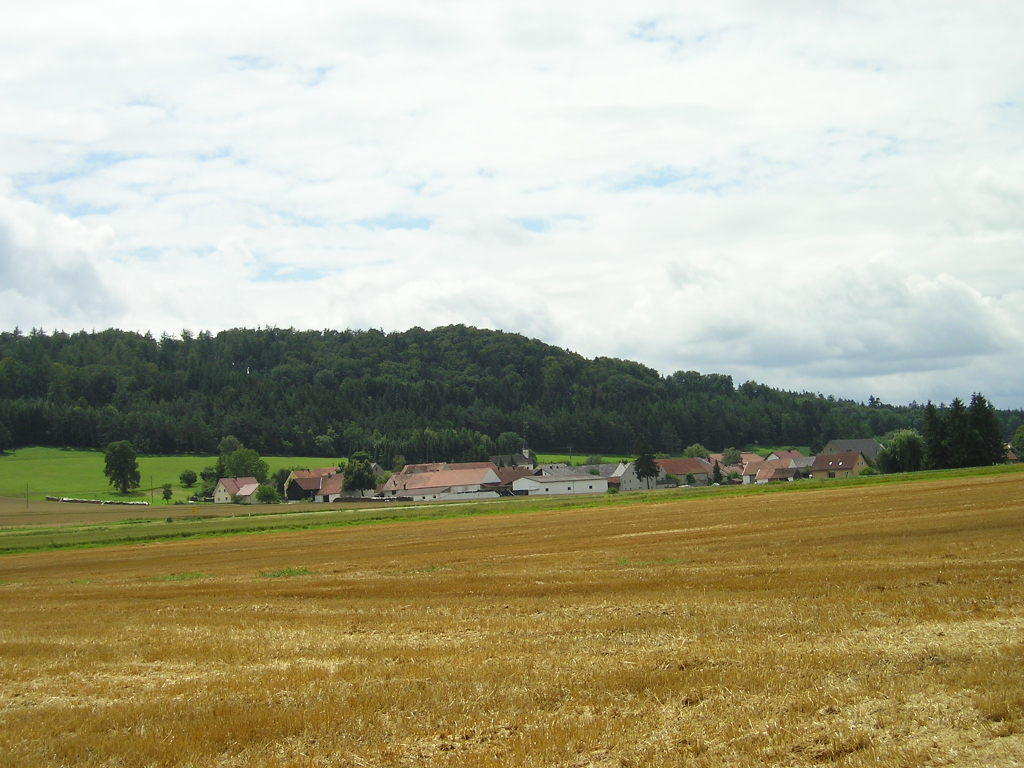 Ellenbrunn (Markt Rennertshofen) im Landkreis Neuburg-Schrobenhausen